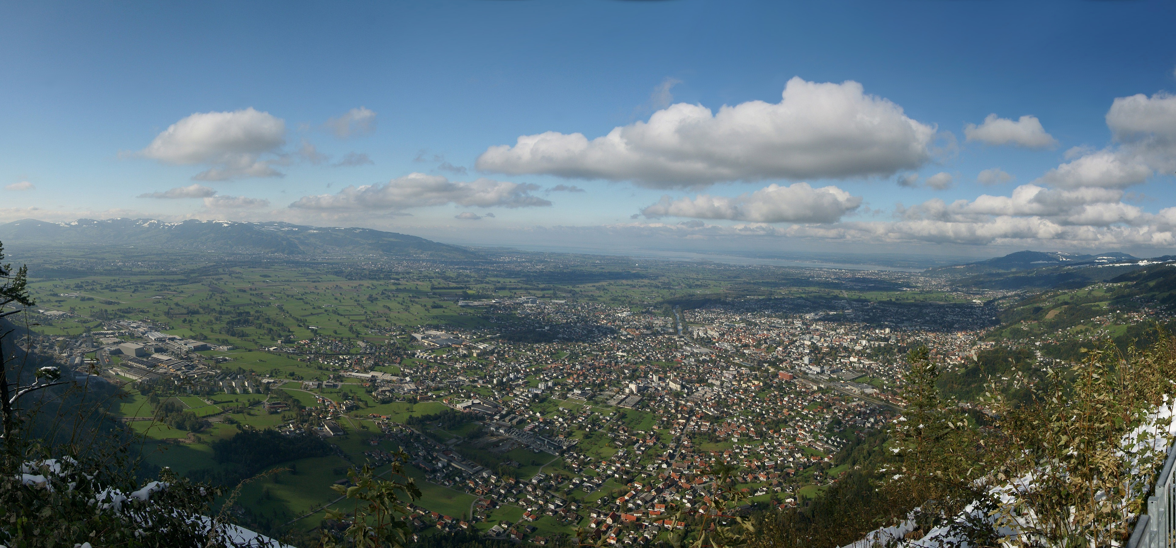 Panorama von der Karren-Bergstation auf Dornbirn und den Bodensee.